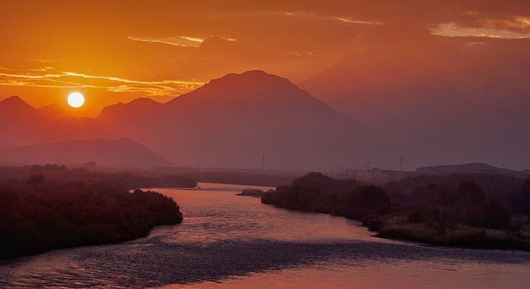 Araz çayı və Culfa rayonu